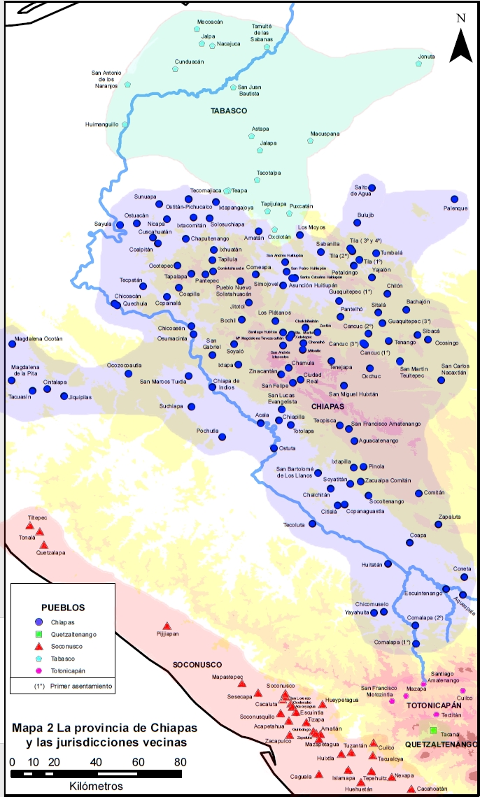 Representa los pueblos que estaban bajo la jurisdicción de las distintas provincias de Chiapas entre el siglo XVI y el XVII